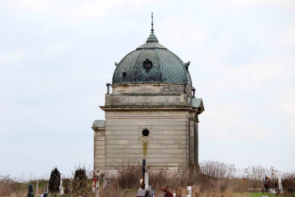 Cripta familiei Mocioni din Foeni - vedere laterala